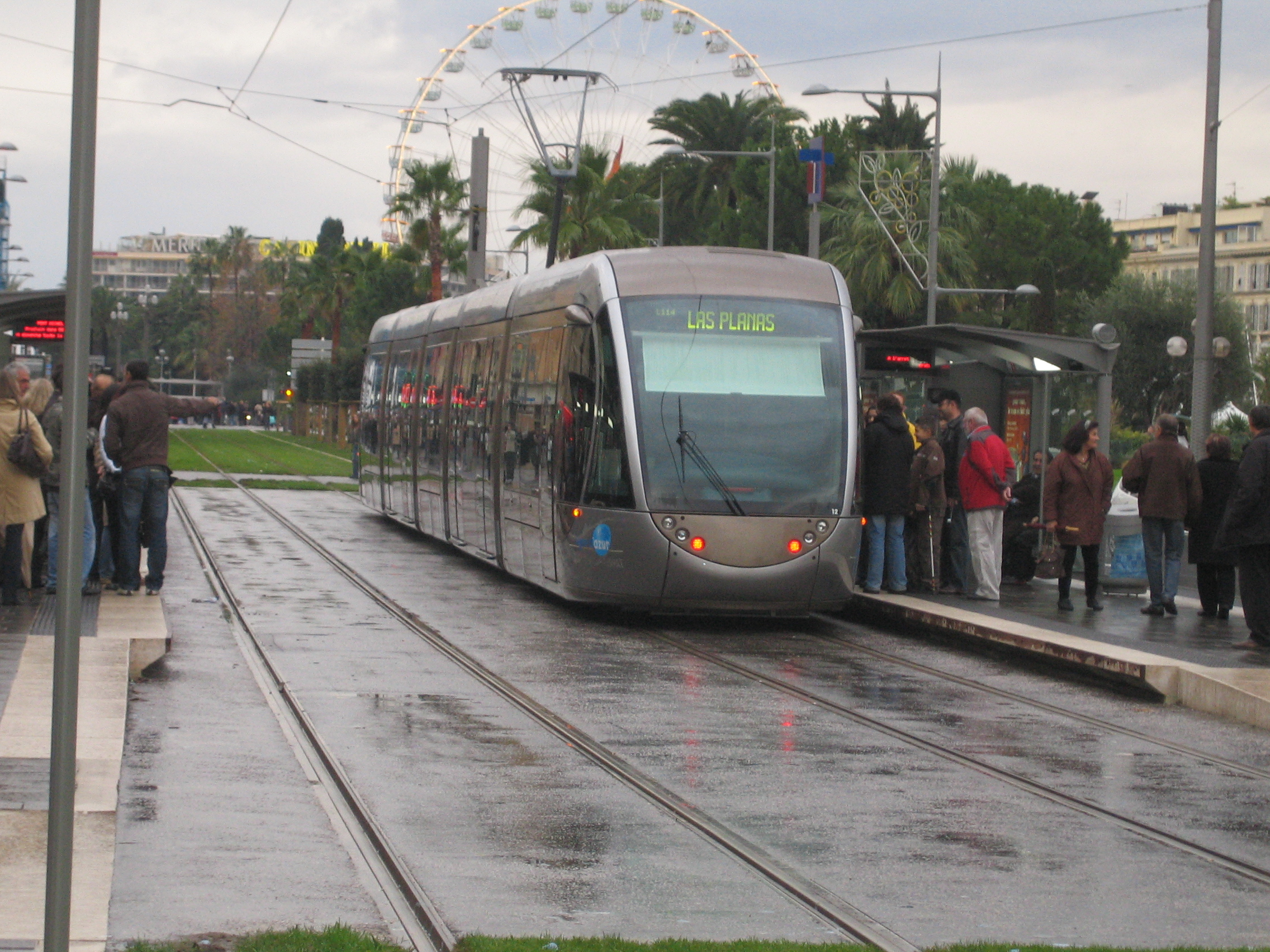 Tramway de Nice le jour de son inauguration - Lieu : Proche de la place Masséna